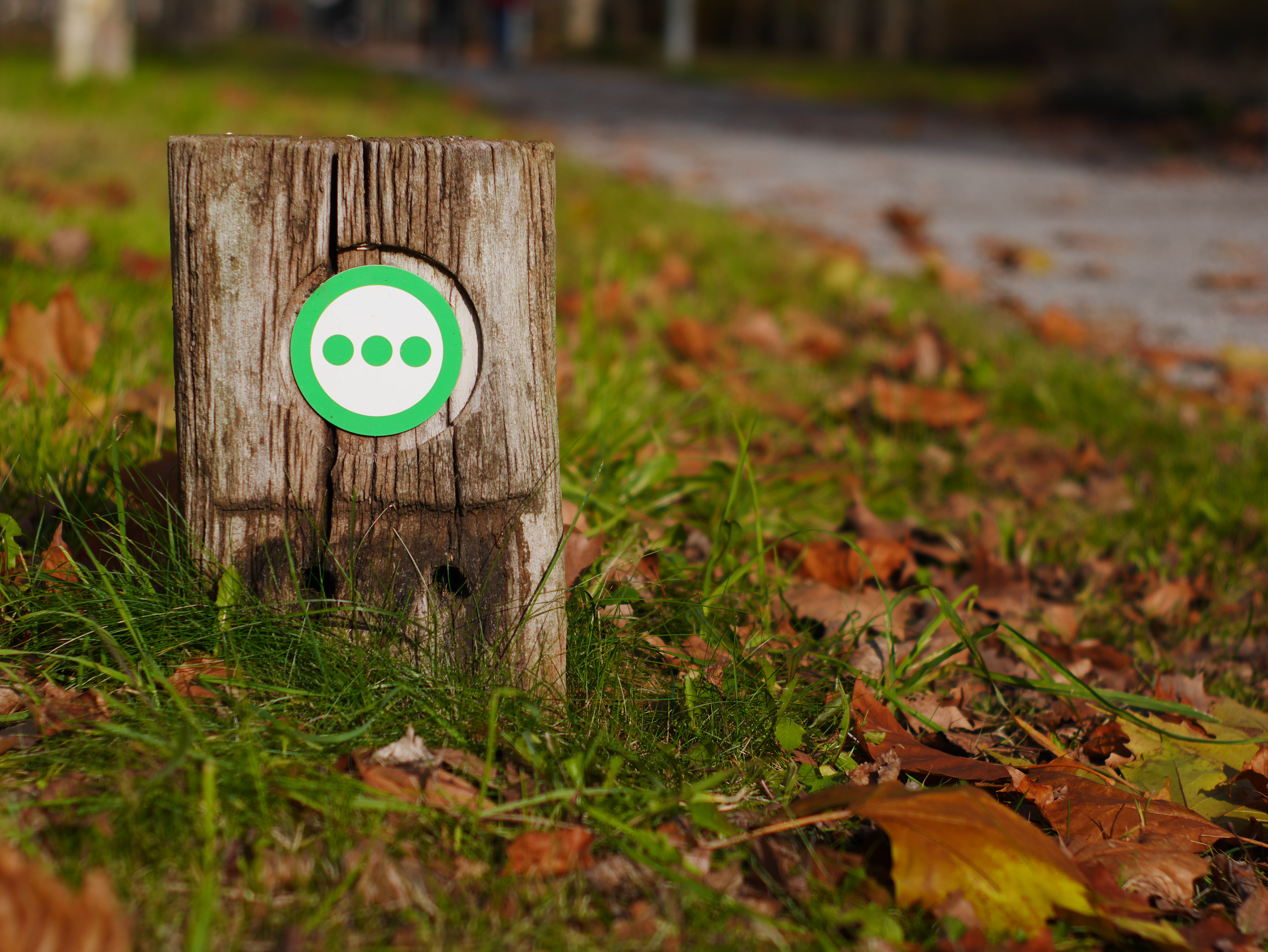 Marca del camino del anillo verde, Vitoria-Gasteiz, Álava, País Vasco, España